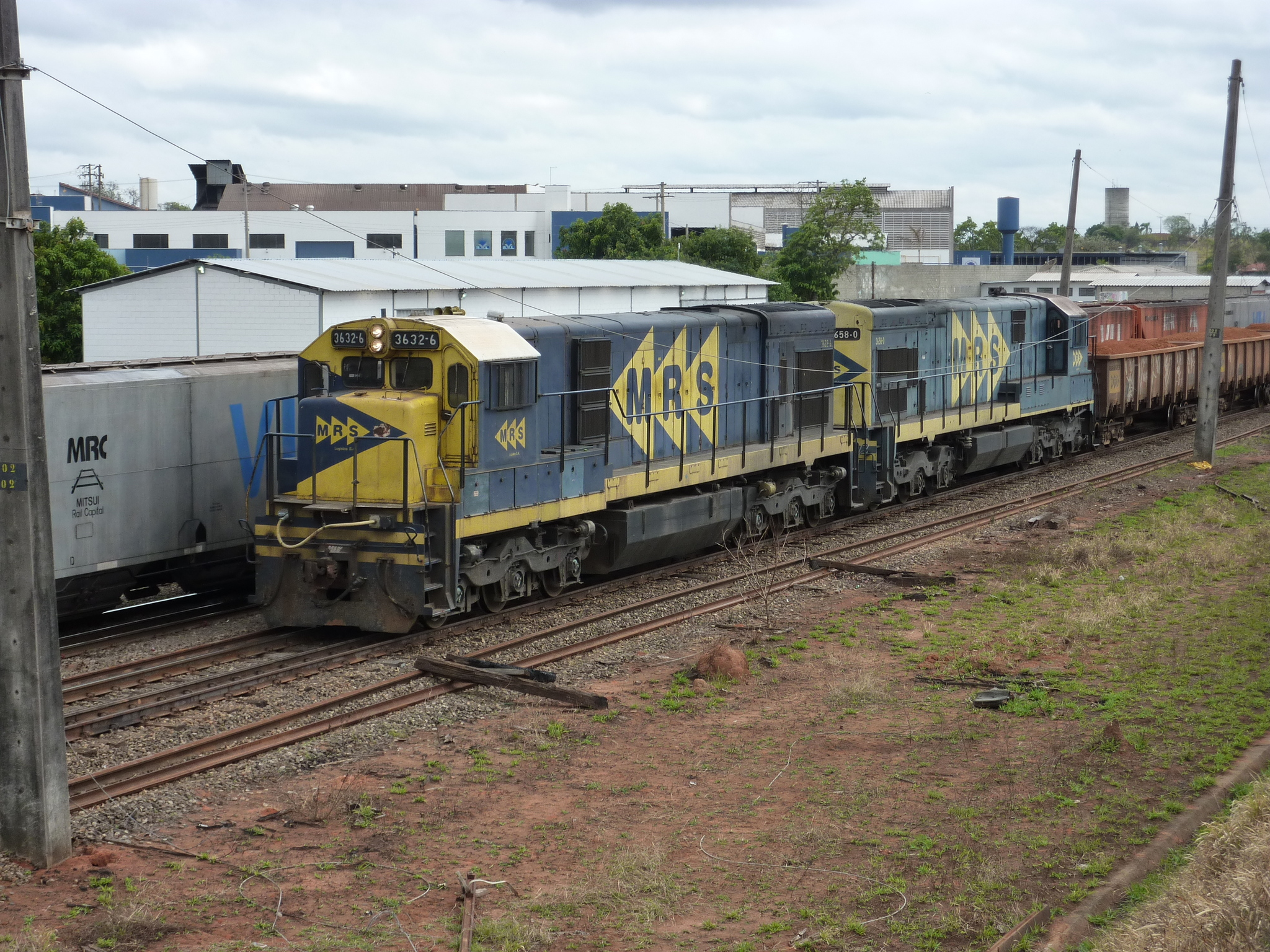 Locomotivas de comboio que passava sentido Guaianã pelo pátio da Estação Ferroviária de Itu - Variante Boa Vista-Guaianã km 202.